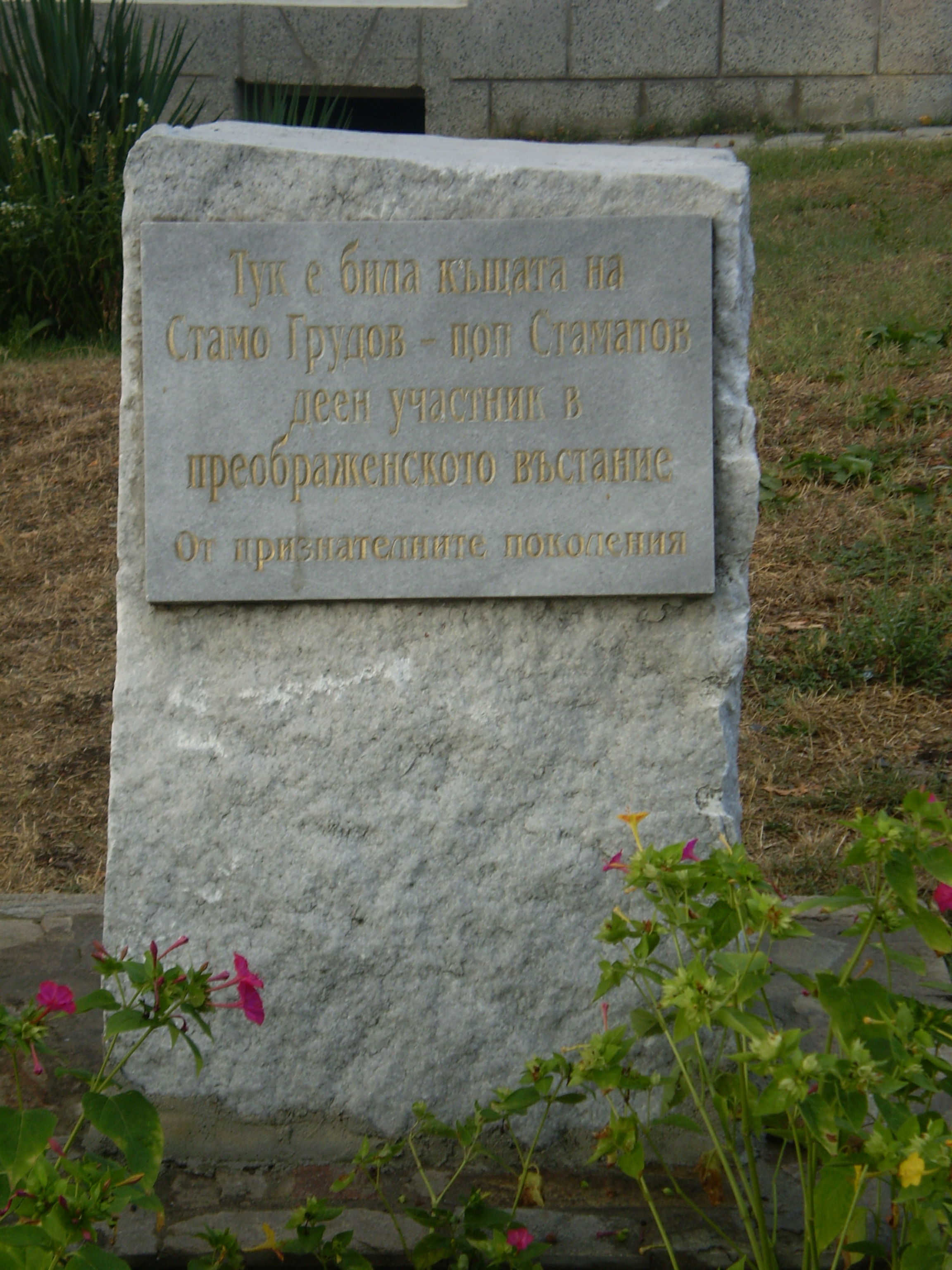 Паметна плоча на мястото на къщата на Стамо Грудов в Ясна поляна, Бургаско.